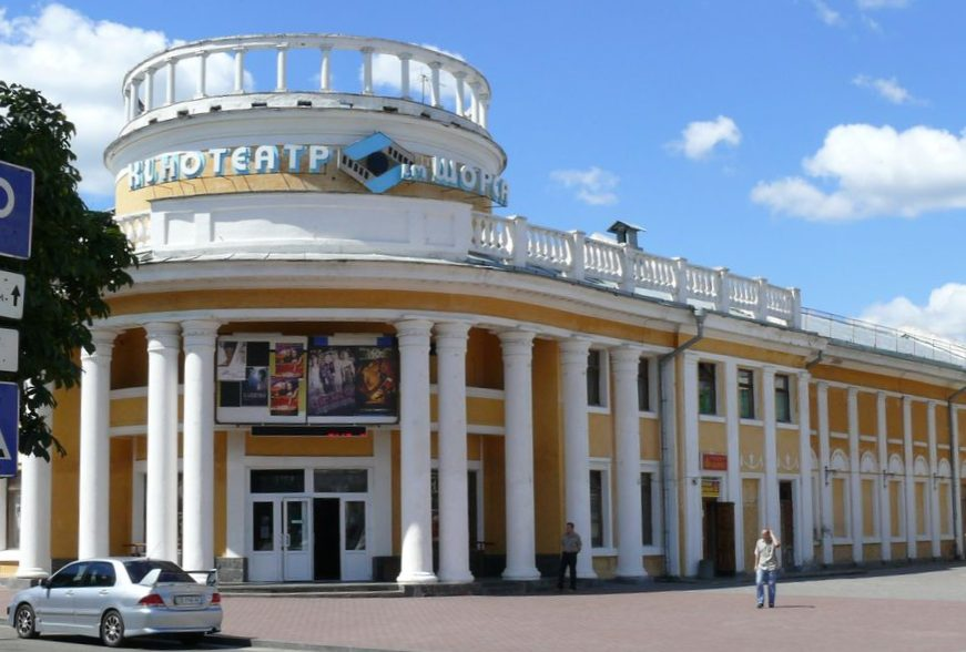 Кинотеатр имени товарища Щорса в городе Чернигове.